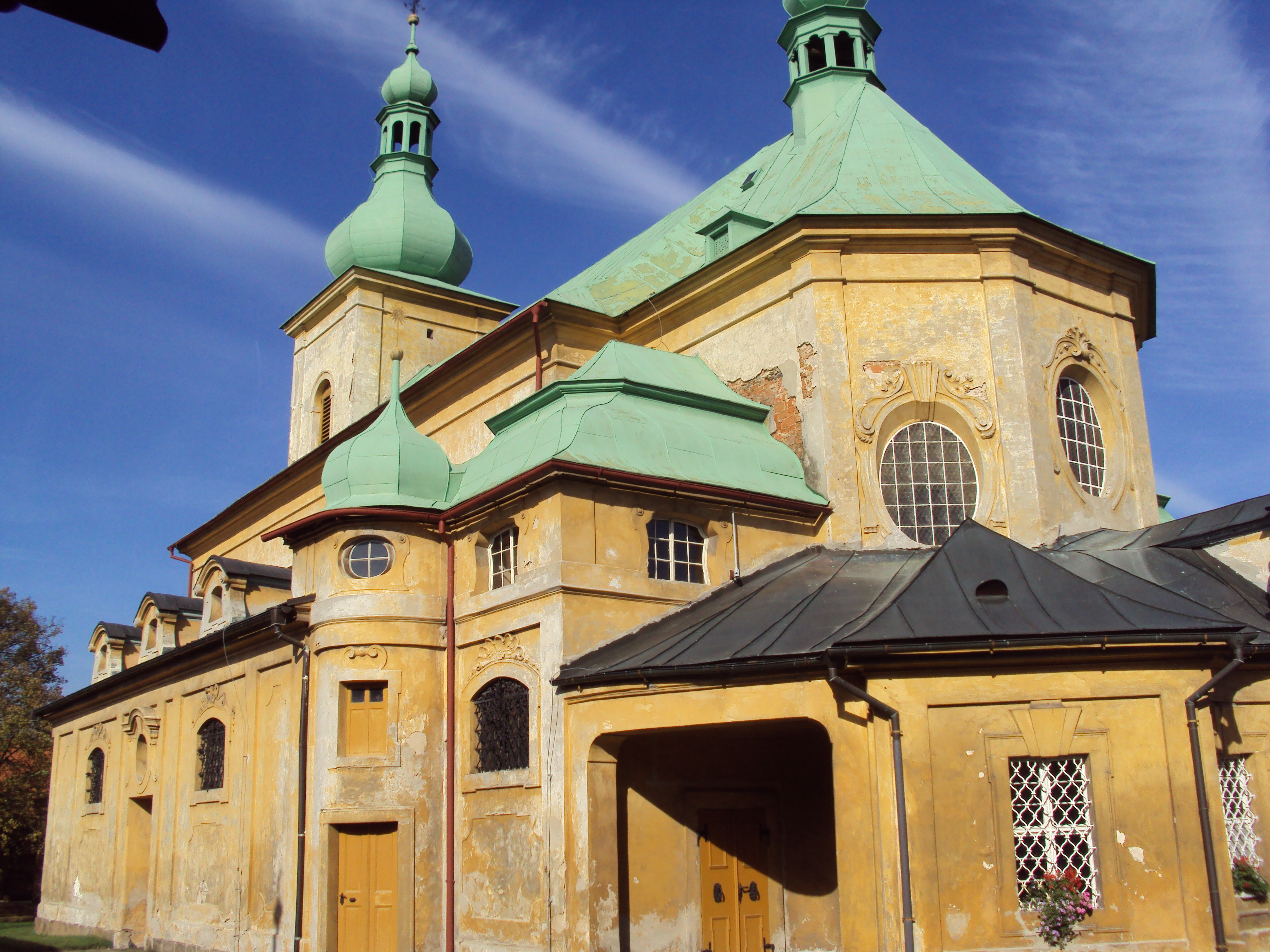 Kostel Nanebevzetí Panny Marie v Horní Polici